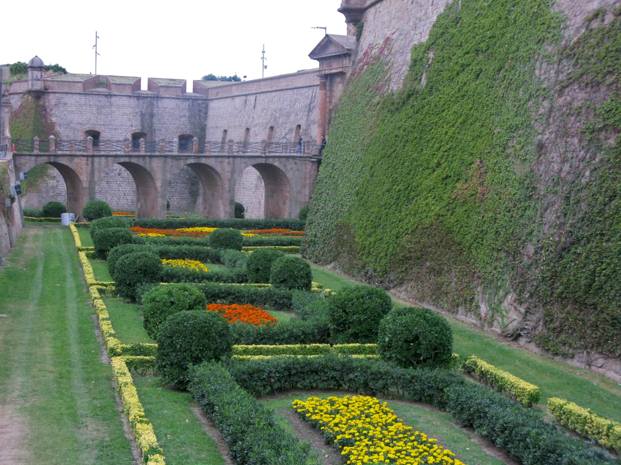 Barcelona Montjüic 106